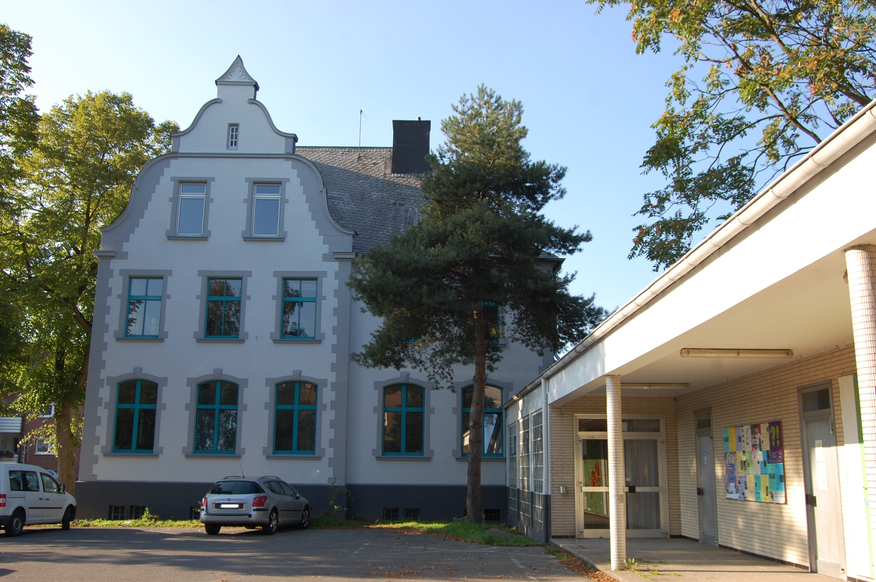 VHS Gebäude, front